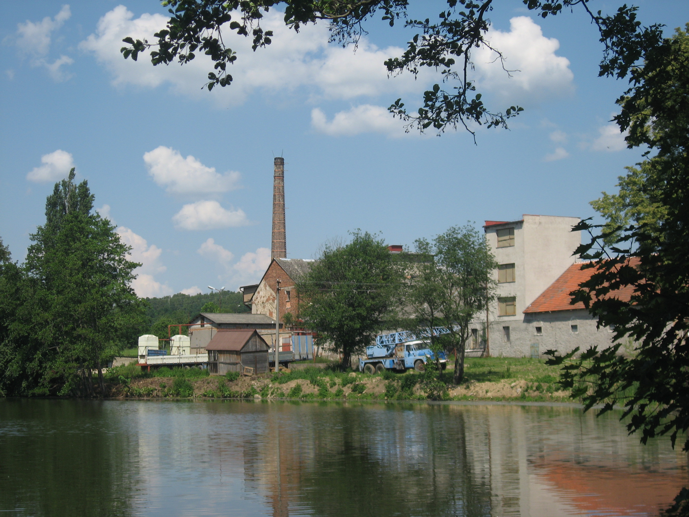 Boňkov, Dvůr, škrobárna. Boňkovský rybník na Boňkovském potoce.